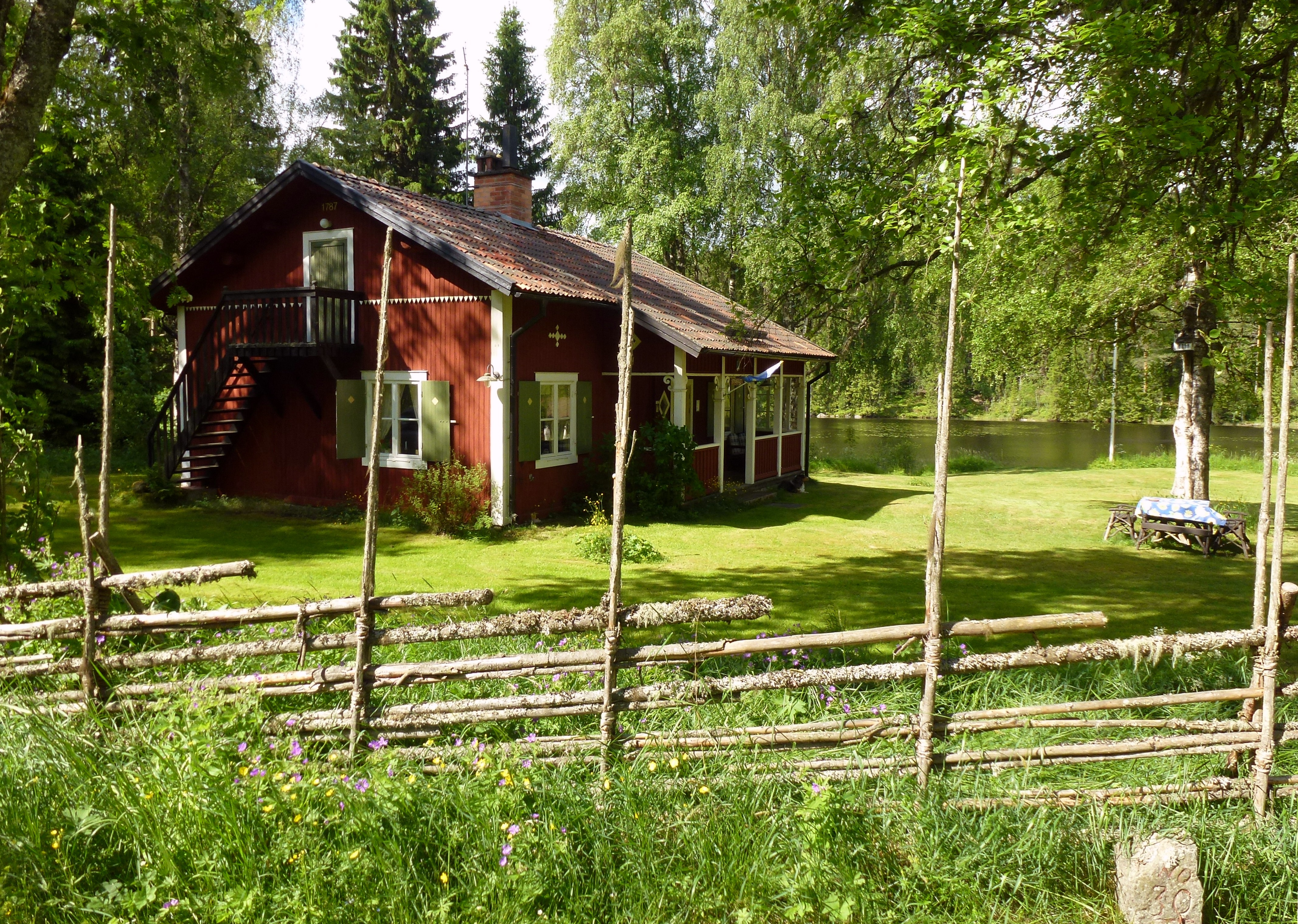 Stenbergsstugan, Nyhammar